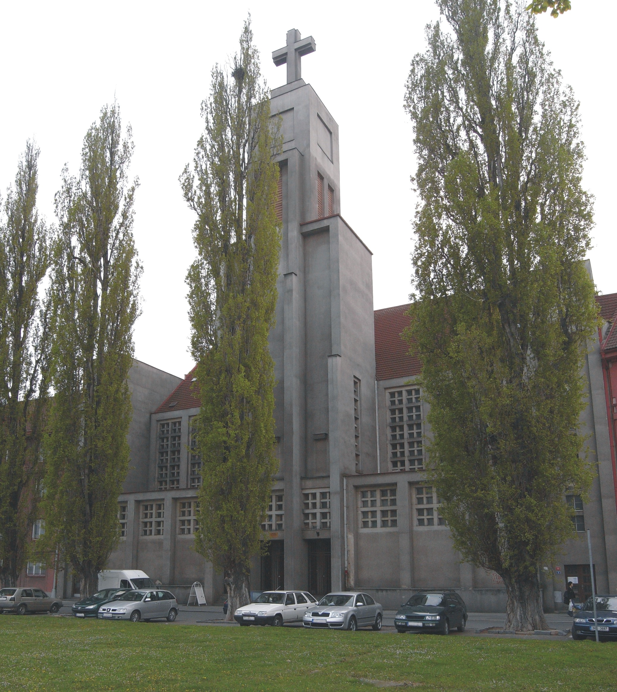 Kirche des Göttlichen Herzen des Herrn, 1932 (Hradec Králové, Tschechische Republik)